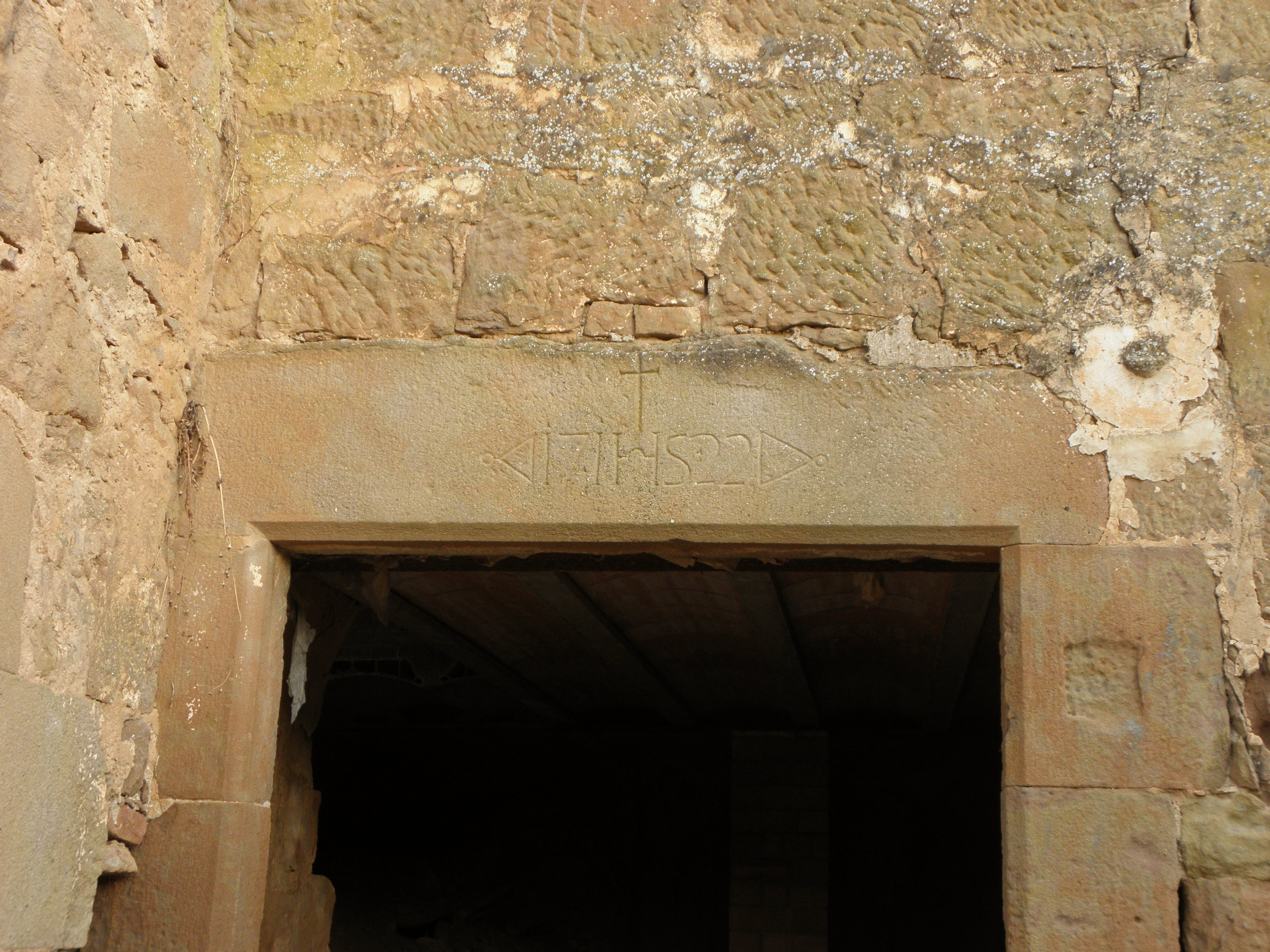 La masia de Cal Batlle, al poble de Sallent (Pinell de Solsonès). Primer pla de la llinda de la porta principal amb la data 1722.